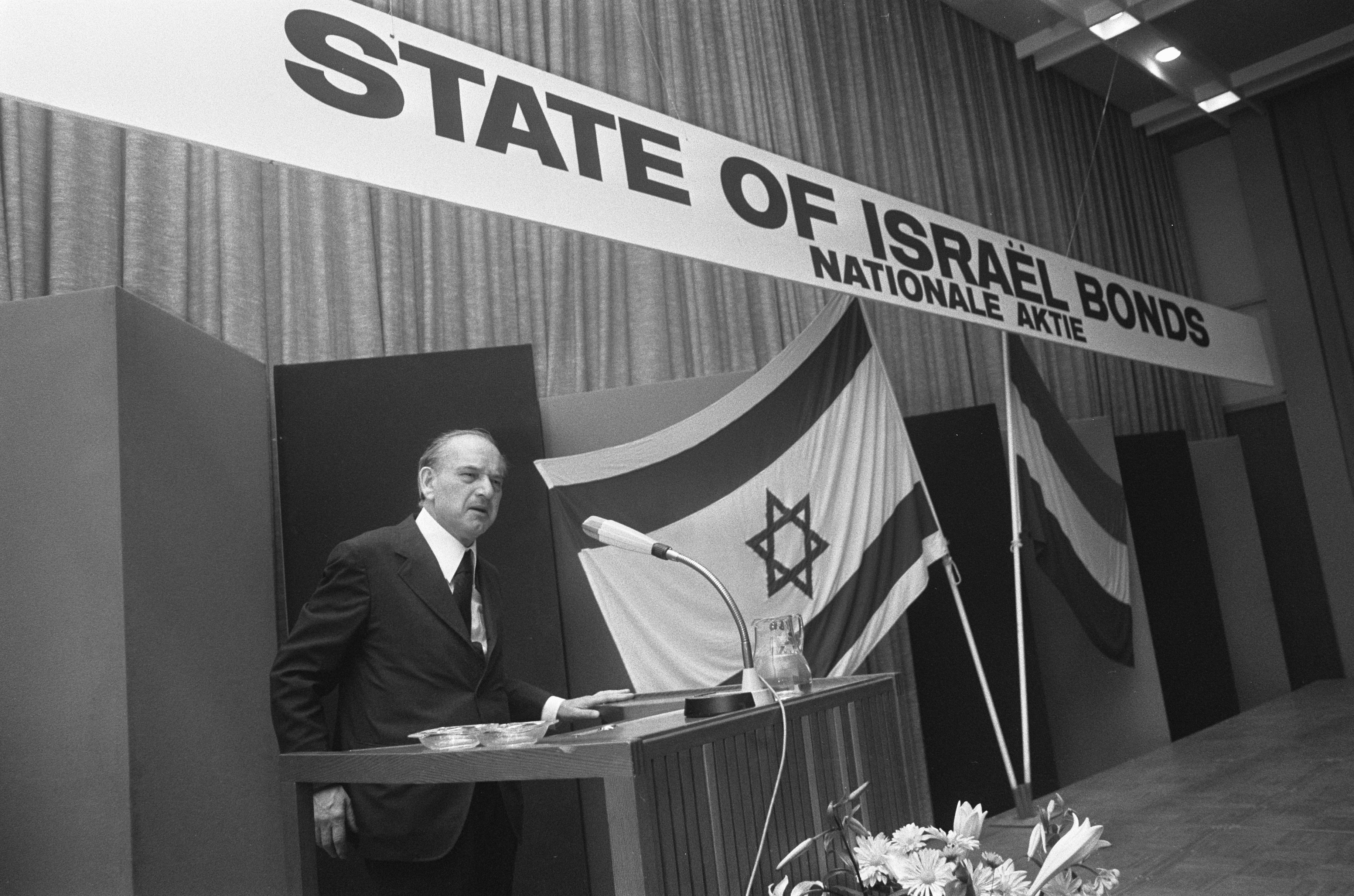 Collectie / Archief : Fotocollectie Anefo Reportage / Serie : [ onbekend ] Beschrijving : State of Israel Bonds in Glazen Zaal in RAI, opdracht heer Sijer Datum : 20 mei 1974 Persoonsnaam : Glazen Zaal Instellingsnaam : State of Israel Bonds Fotograaf : Peters, Hans / Anefo Auteursrechthebbende : Nationaal Archief Materiaalsoort : Negatief (zwart/wit) Nummer archiefinventaris : bekijk toegang 2.24.01.05 Bestanddeelnummer : 927-2034